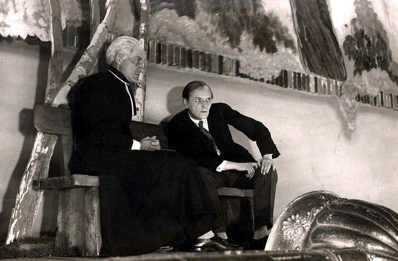 Maurice Rostand: Megöltem egy embert. Új Színház. Boray Lajos (A gyóntatóatya) és Baló Elemér („Ő”).